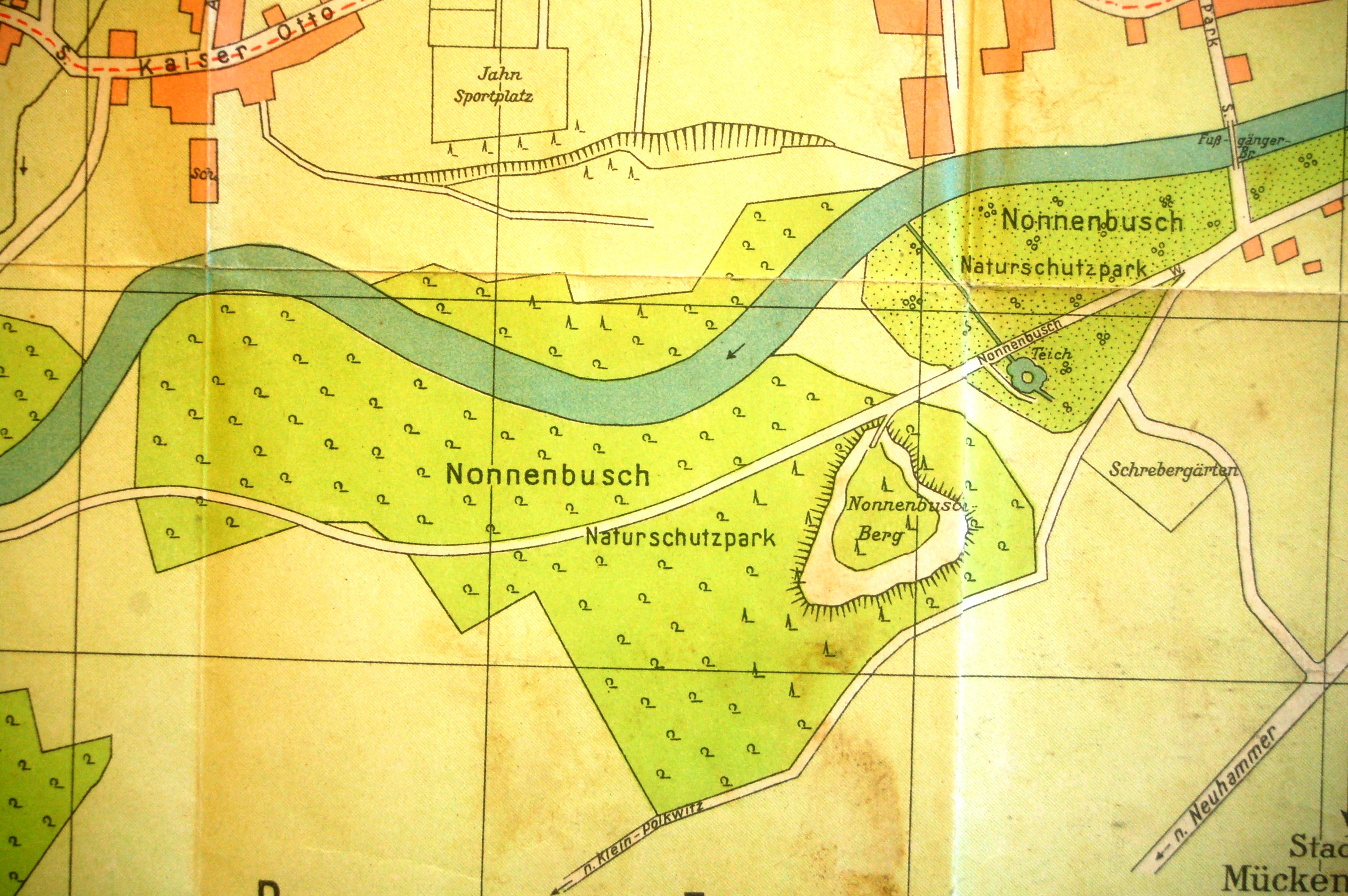 Do 1945 roku wschodni fragment dzisiejszego Parku Słowiańskiego w Szprotawie nosił nazwę Nonnenbusch i był objęty ochroną prawną (Naturschutzpark). Przedstawione zdjęcie stanowi wycinek archiwalnego planu miasta Szprotawa (Sprottau).